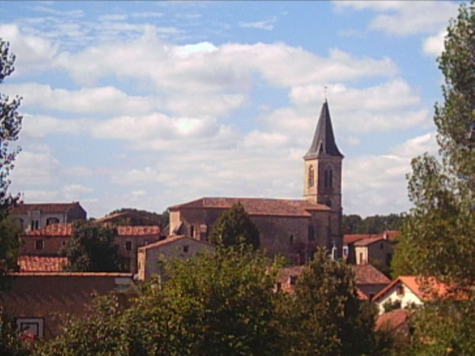 Vue du village de Fauch (France, Tarn, 81120).